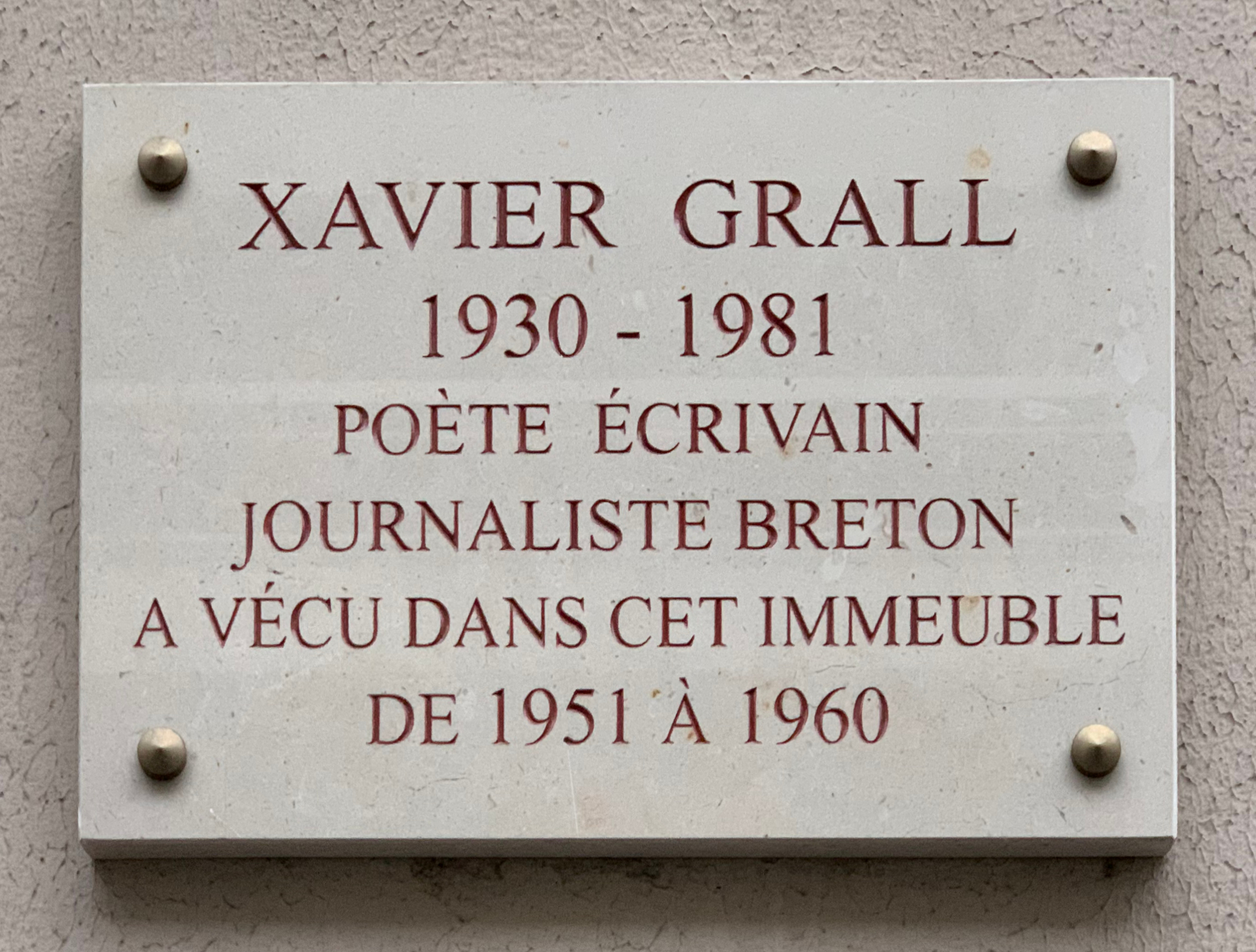 Plaque à Xavier Grall au 58 rue du Théâtre (Paris) ; article sur le sujet. Lieu d'habitation de 1951 à 1960.